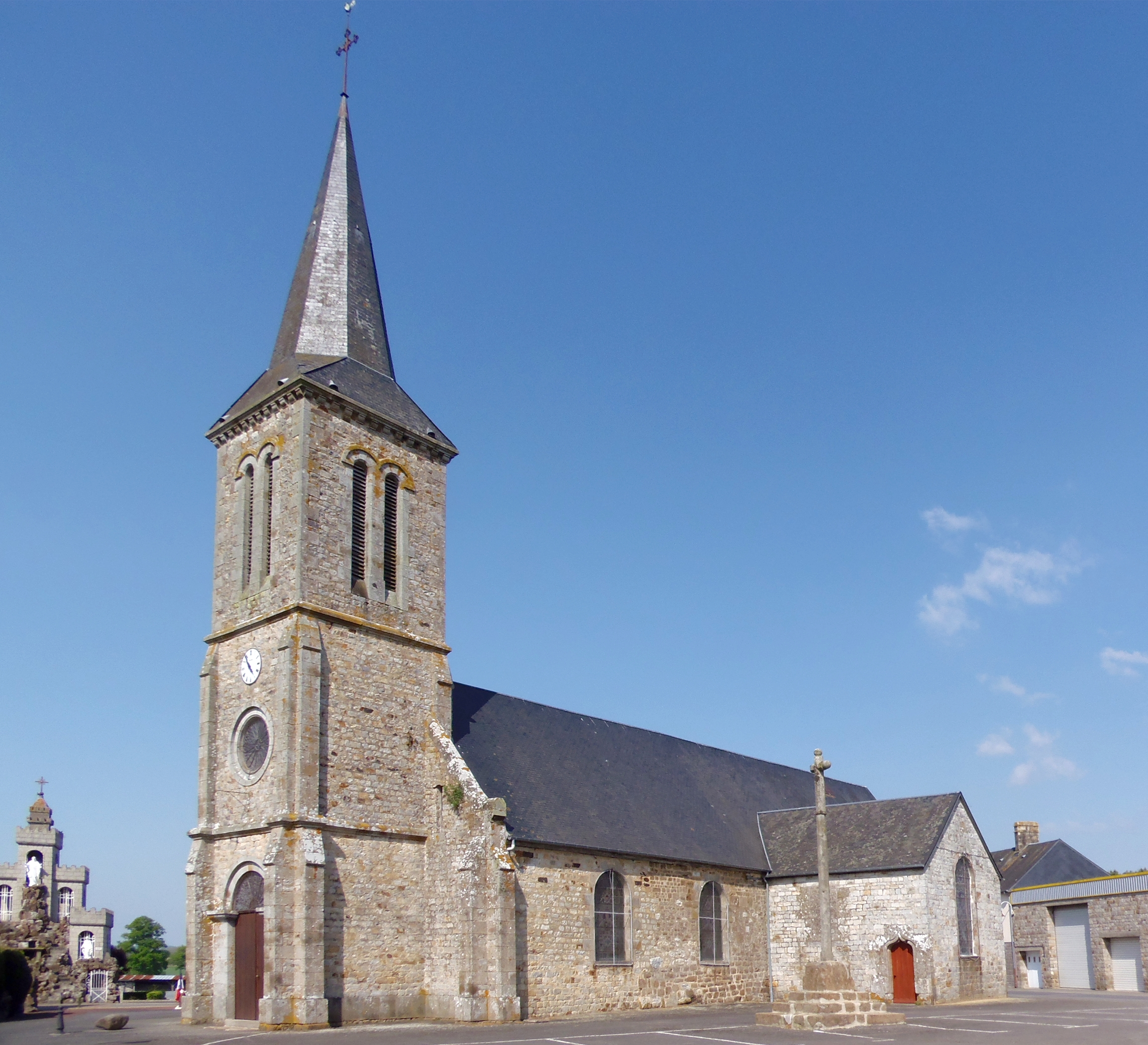 Saint-Roch-sur-Égrenne (Normandie, France). L'église Saint-Roch.